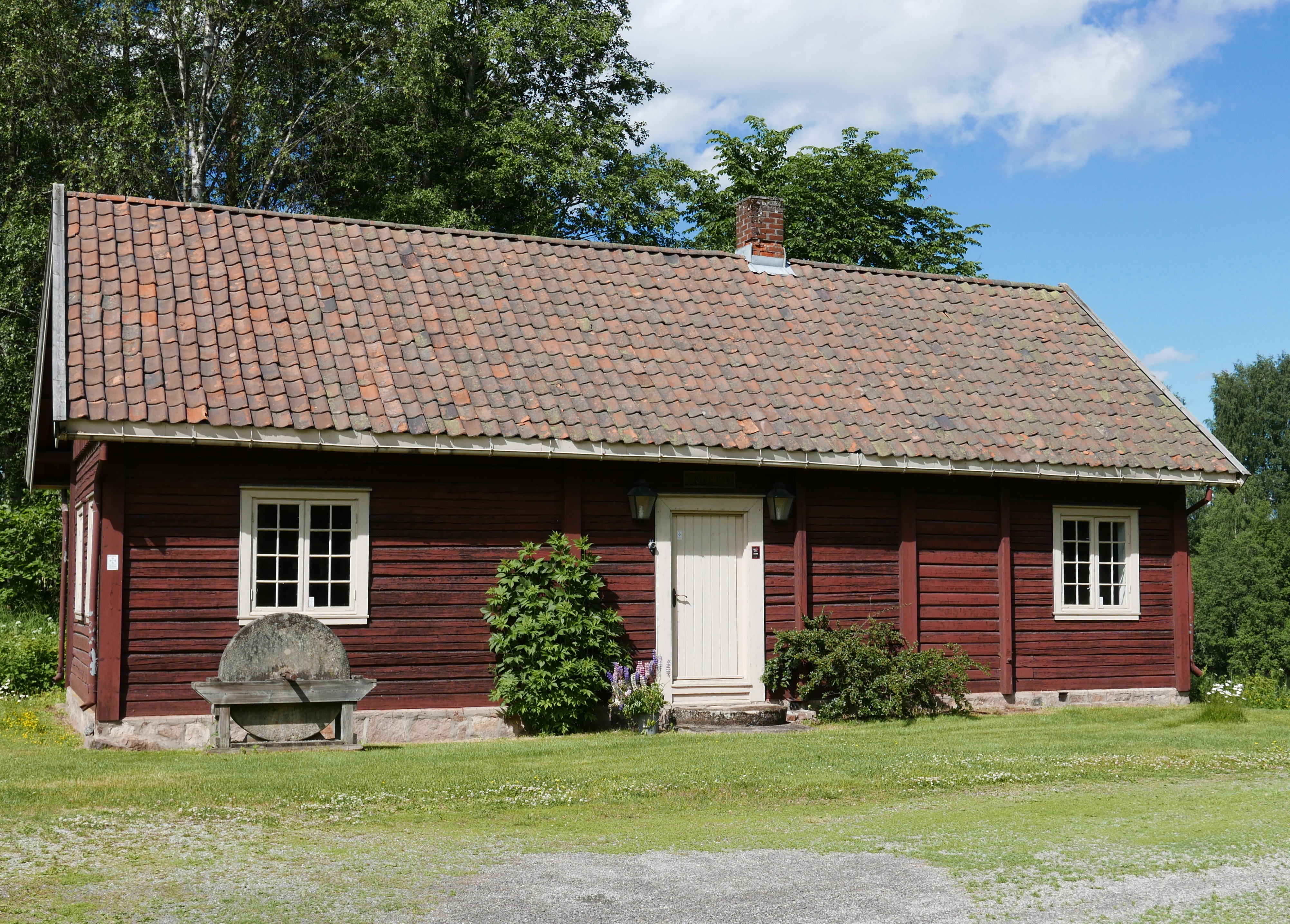 Krutthuset ved Eidsvollsbygningen står fortsatt – det eneste som står igjen etter Eidsvold jernverk.